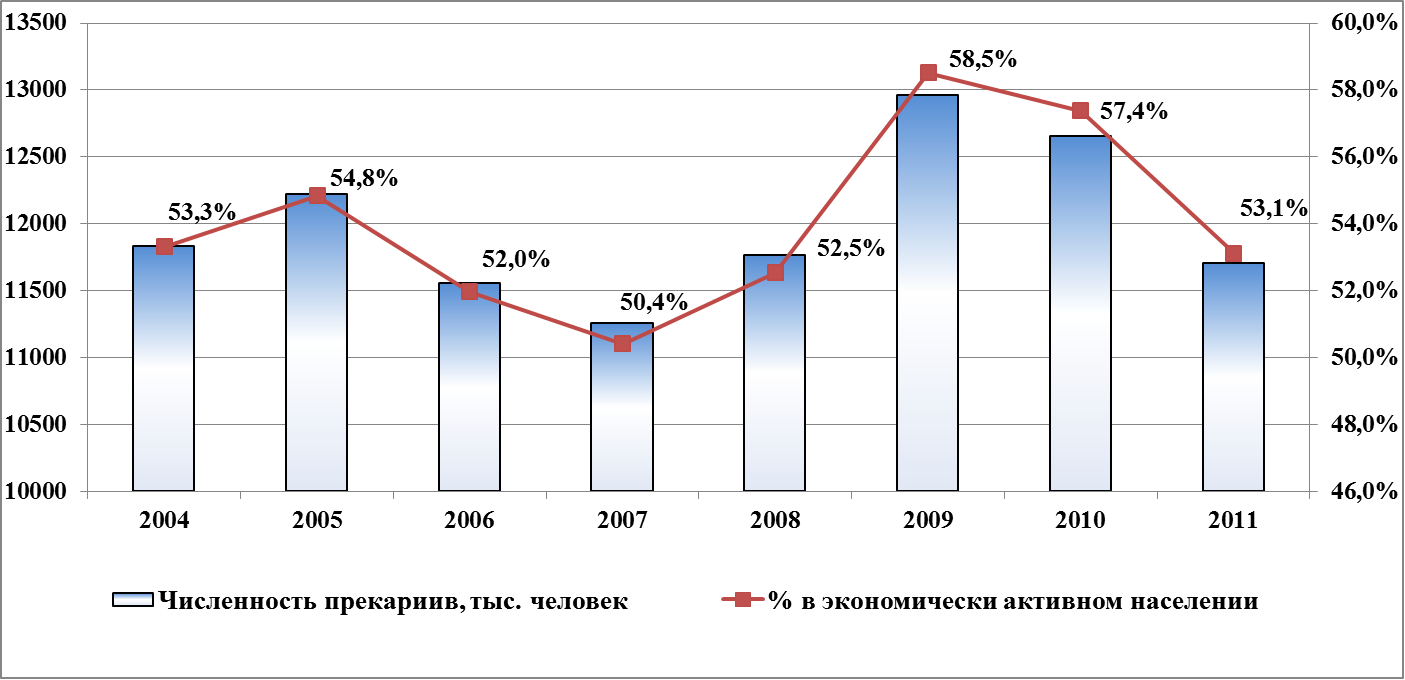 Графік, що показує рівень прекарної зайнятості населення України по рокам з 2004 до 2011.